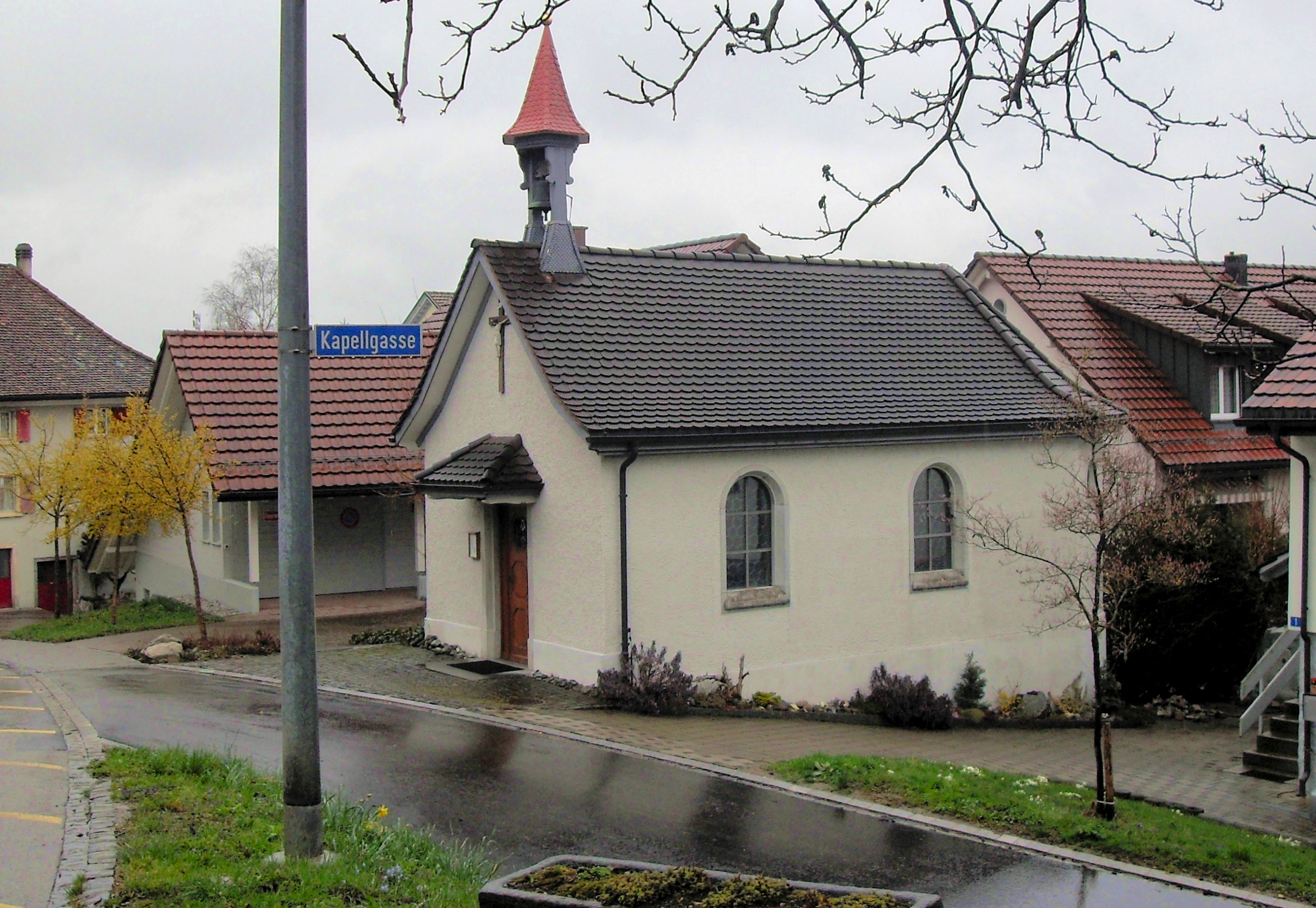 katholische Kapelle Lanzenneunforn, Gemeinde Herdern, Kanton Thurgau, Schweiz